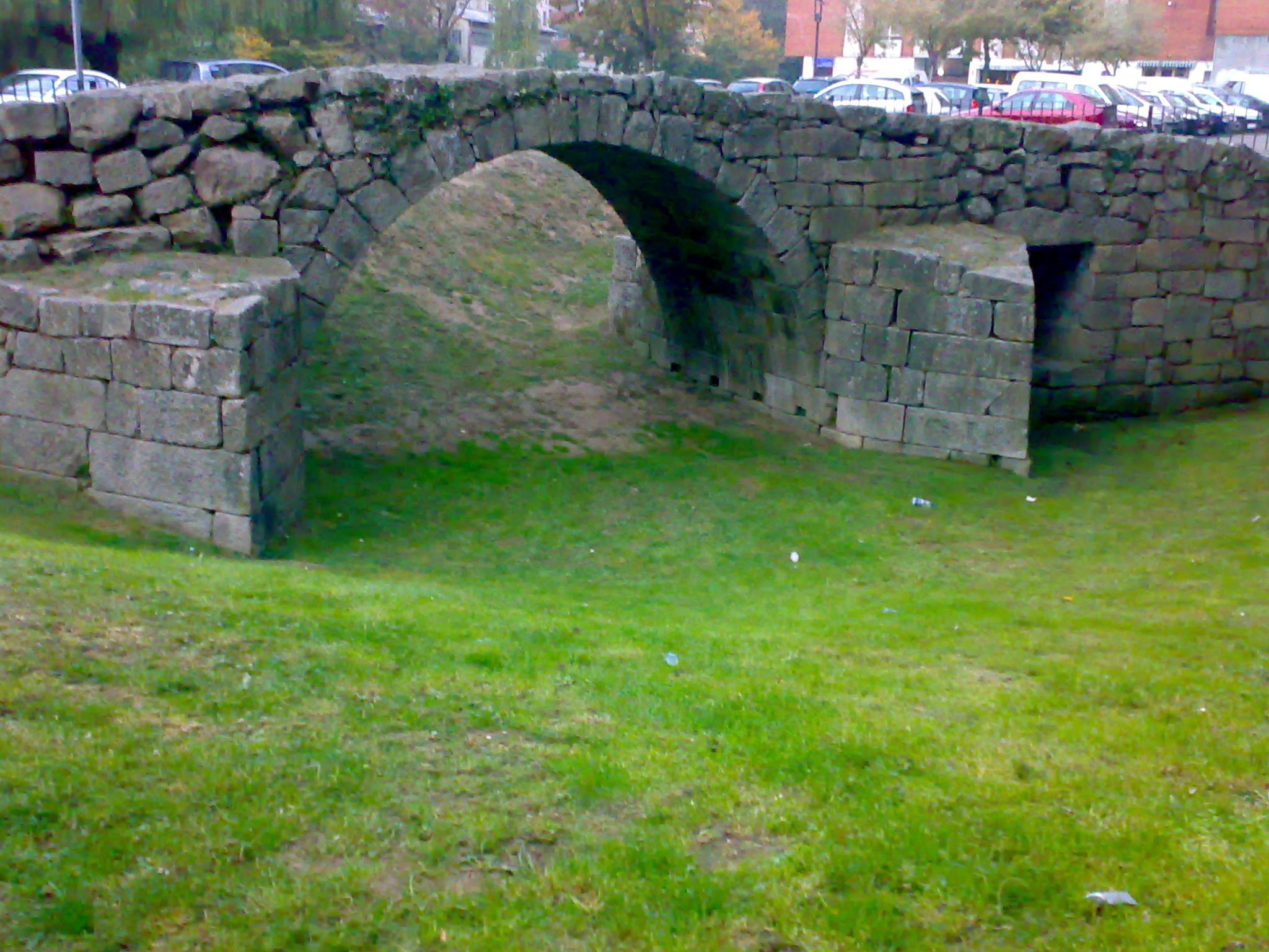 Vigo puente romano